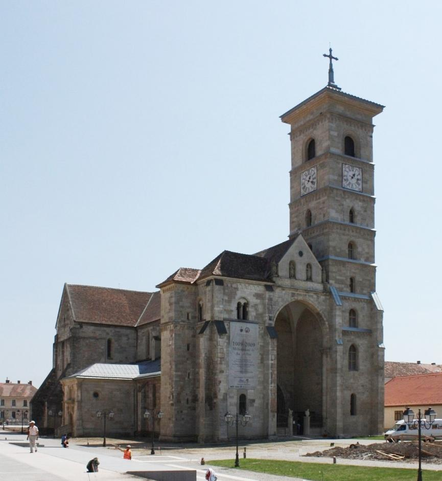 Situl urban "Cetatea Alba Iulia"